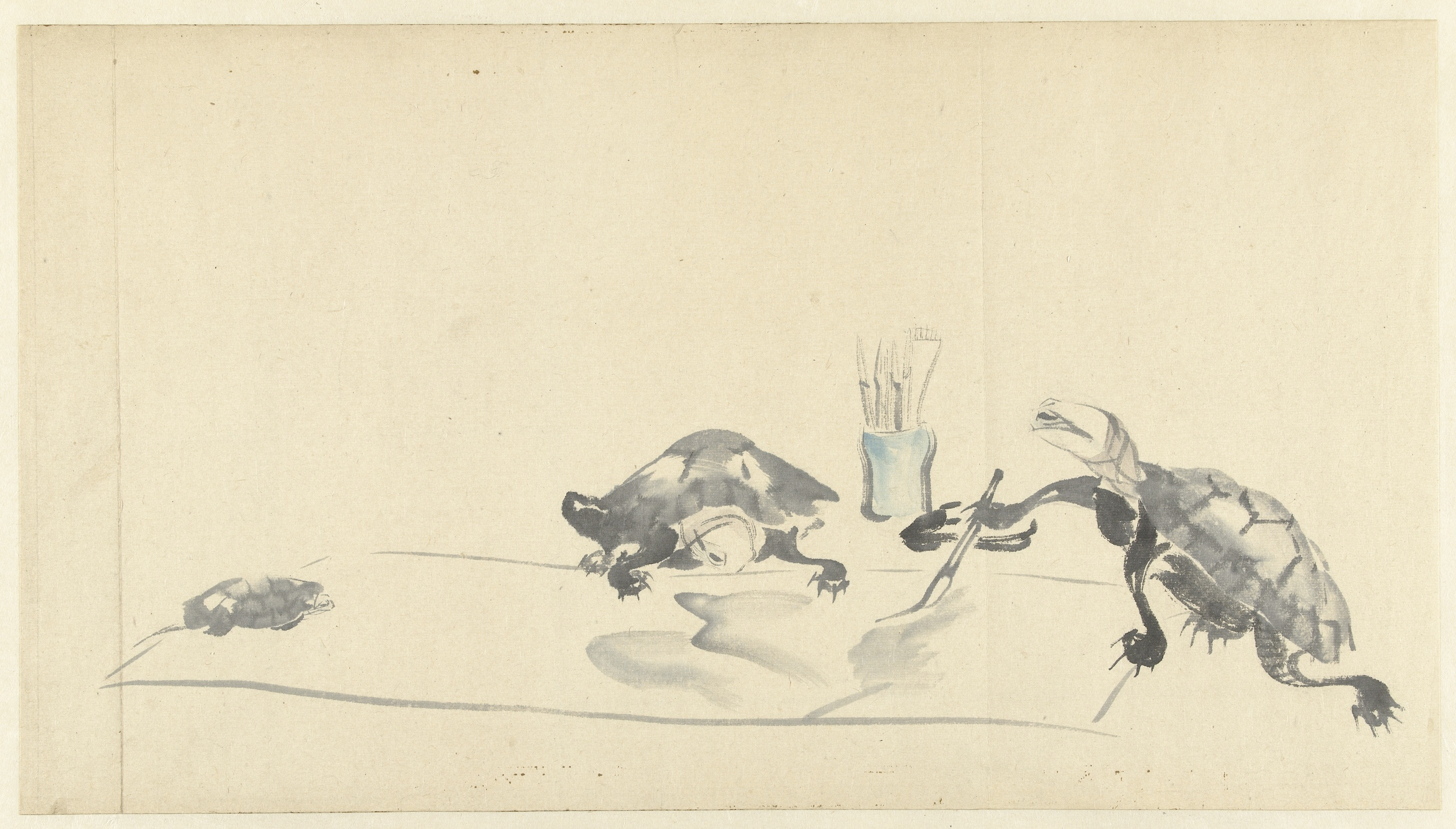 Met penseel schilderende schildpad en twee toekijkende schildpadden; op de achtergrond een pot met kwasten. Label Line: Onishi Chinnen (1792 - 1851), 1810 - 1850, penseel tekening Collection: prenten; Japan (collectie)